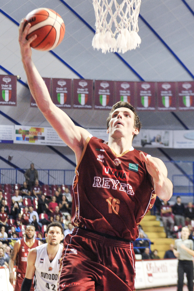 Benjamin Ortner con la maglia della Reyer Venezia